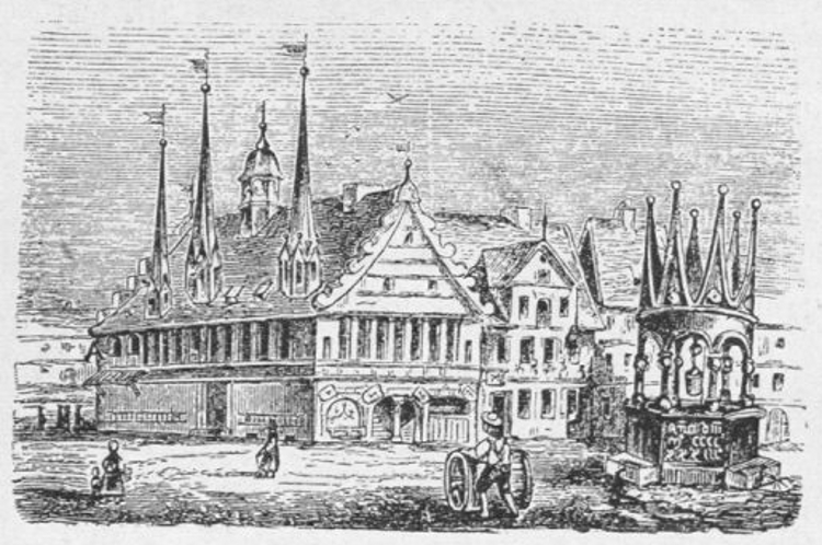 Das Sackrathaus mit Brunnen in Braunschweig.